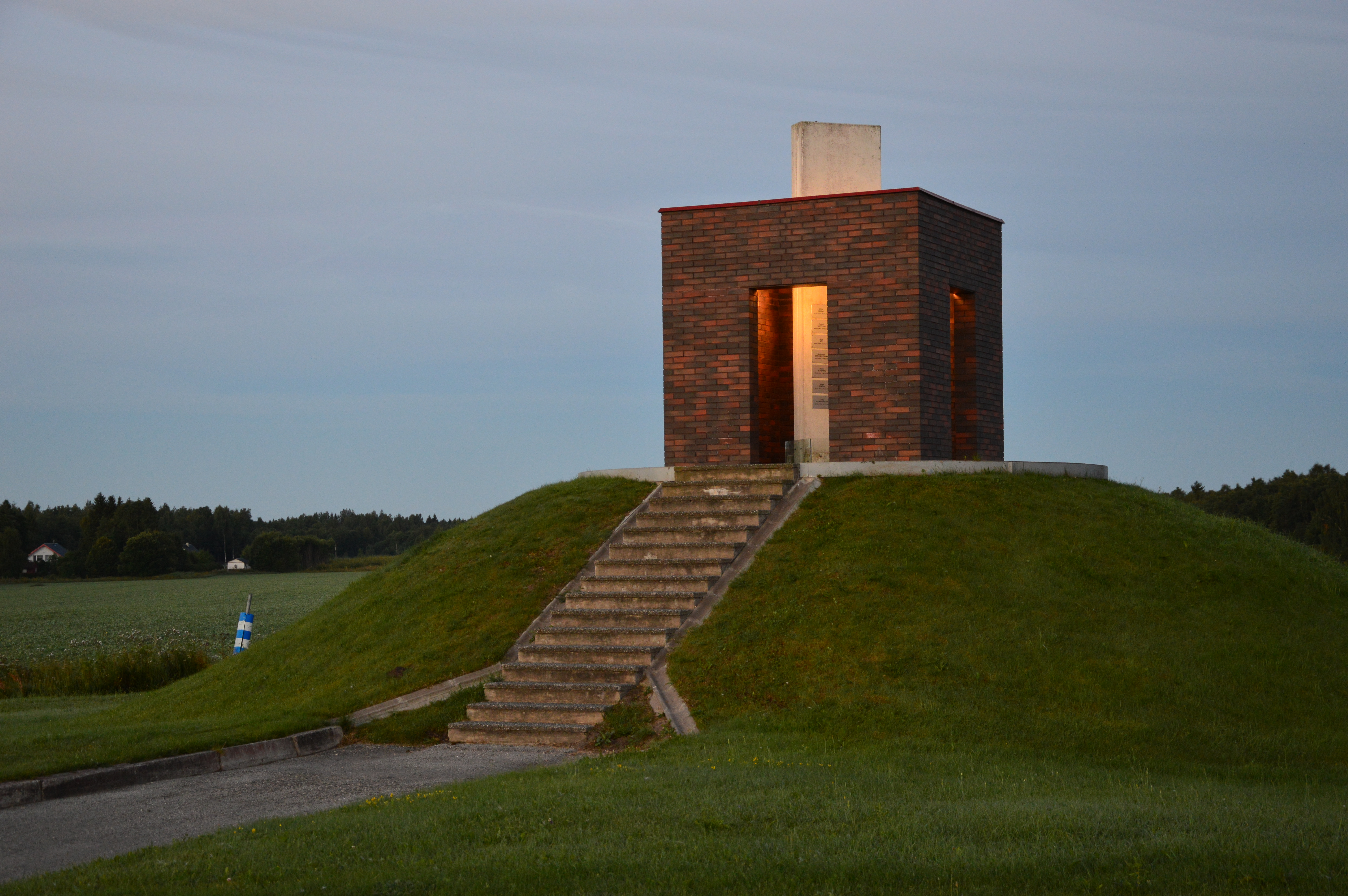 Mälestusmärk töökohustuste täitmisel hukkunud politseinikele.